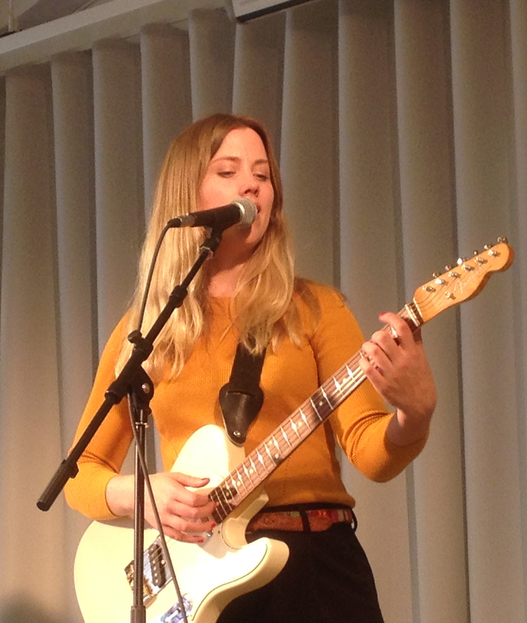 Jenny Almsenius, vid ljudcheck inför konsert i Göteborgs litteraturhus.